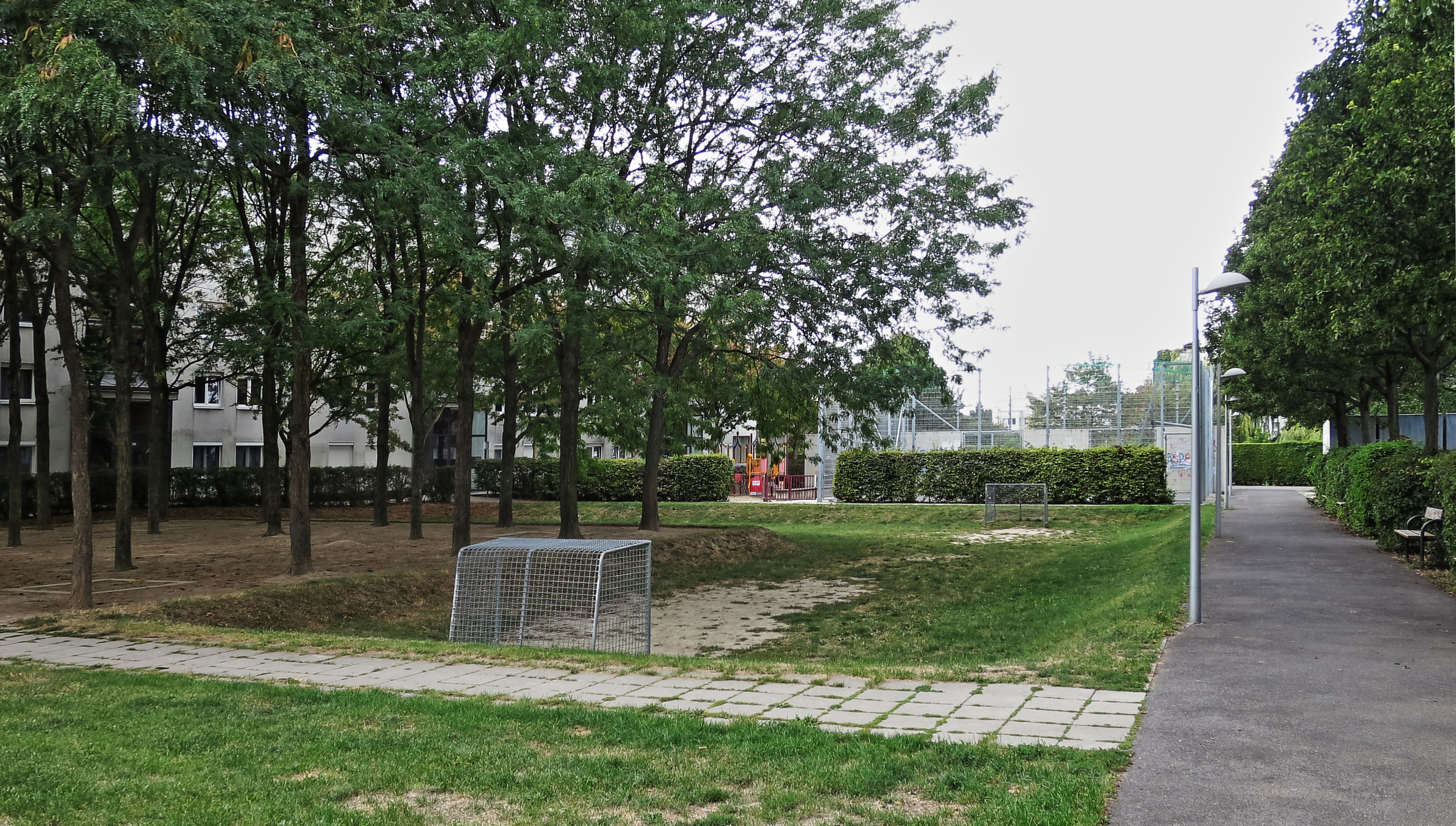 Wien-Donaustadt, Trygve-Lie-Park, Bolzplatz